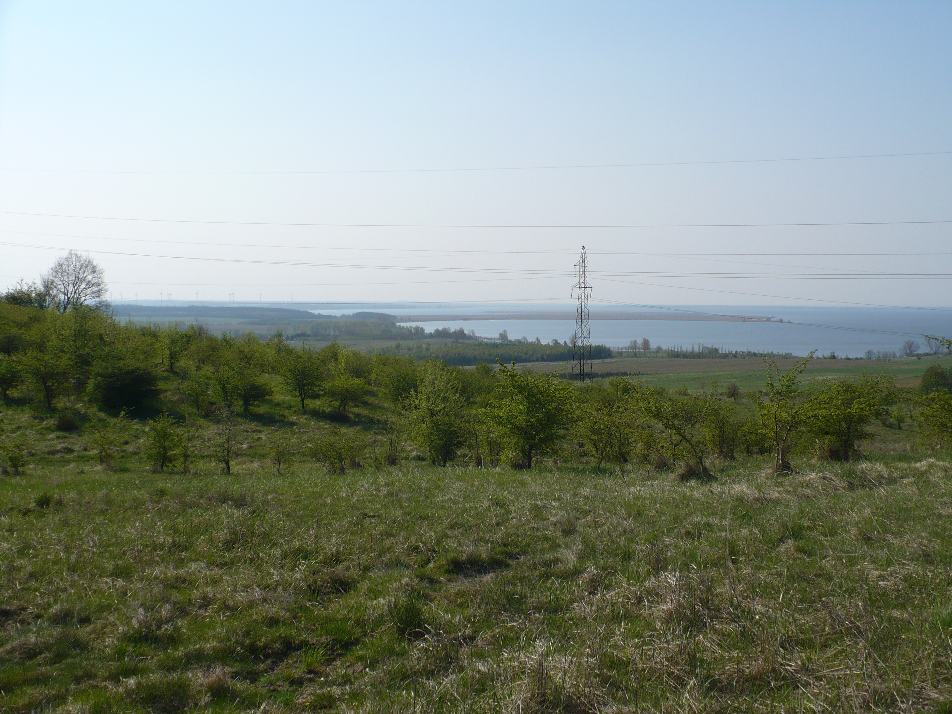 Wyspa Wolin - Mokrzyckie Góry